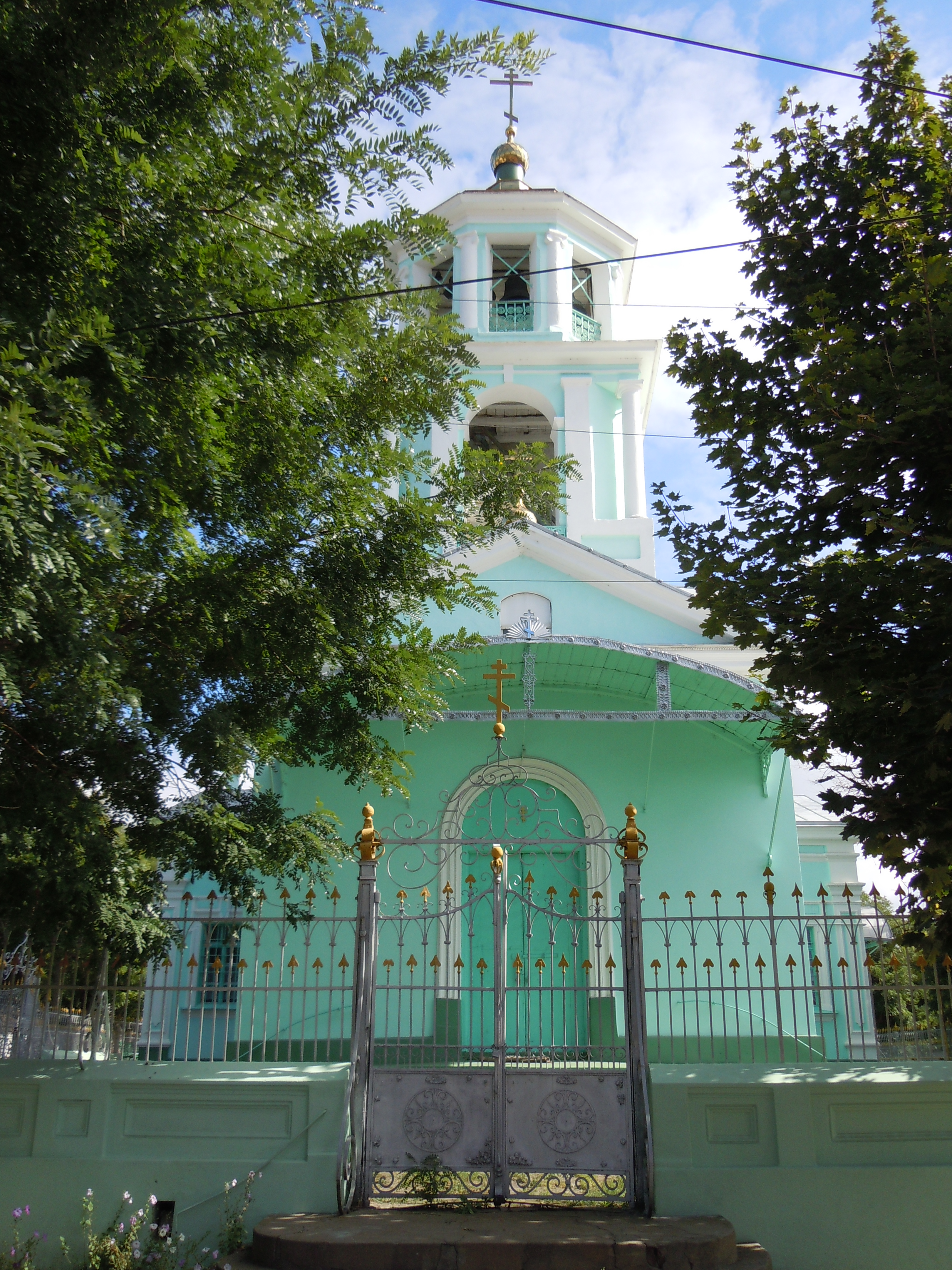 Свято-Миколаївська церква (старообрядська), Ізмаїл, вул. Дзержинського, 124